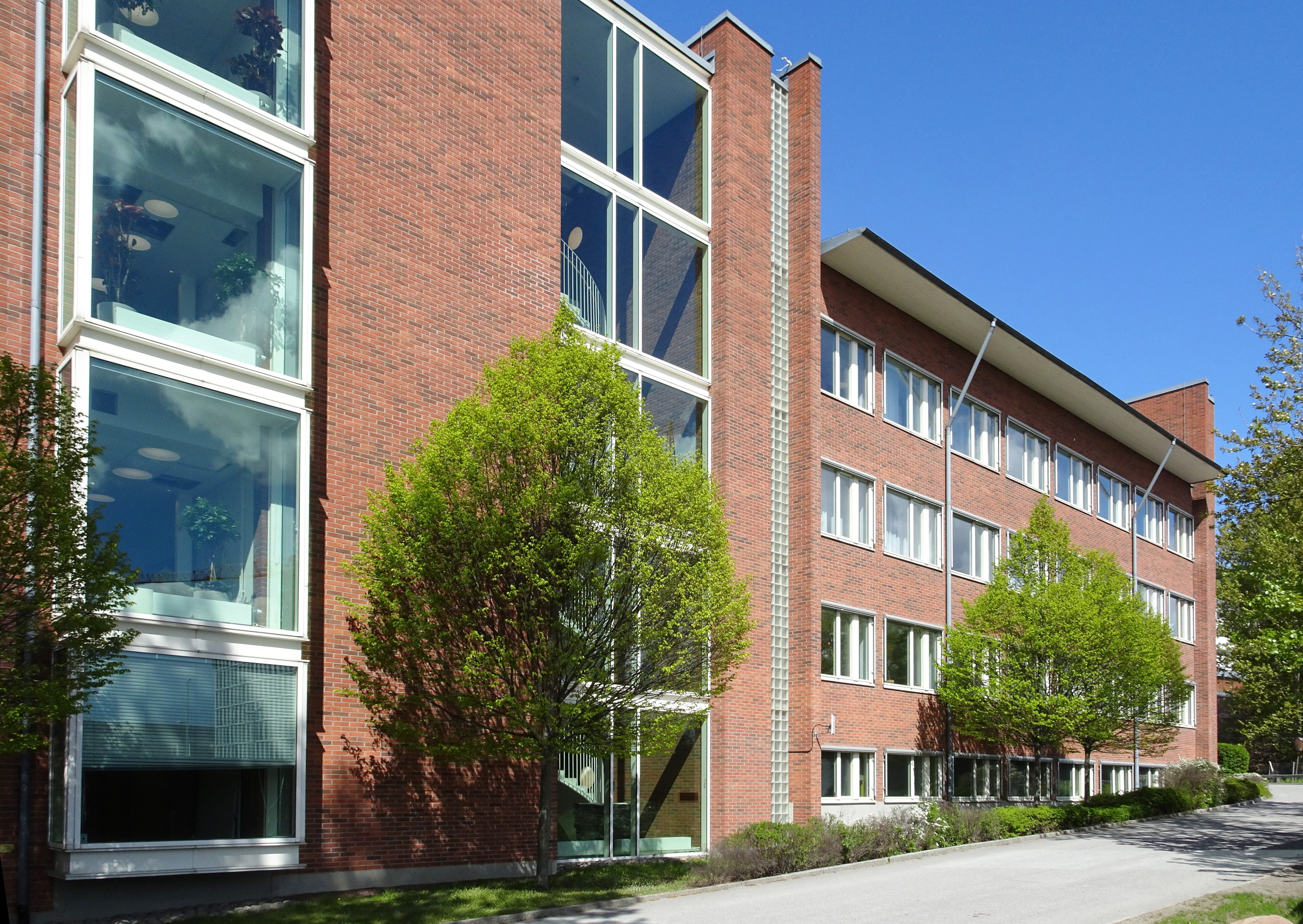 CGB Laboratoriet (Centrum för Genomik och Bioinformatik), Berzelius väg 35, byggår 2001, arkitekt Bjurström & Brodin arkitektkontor